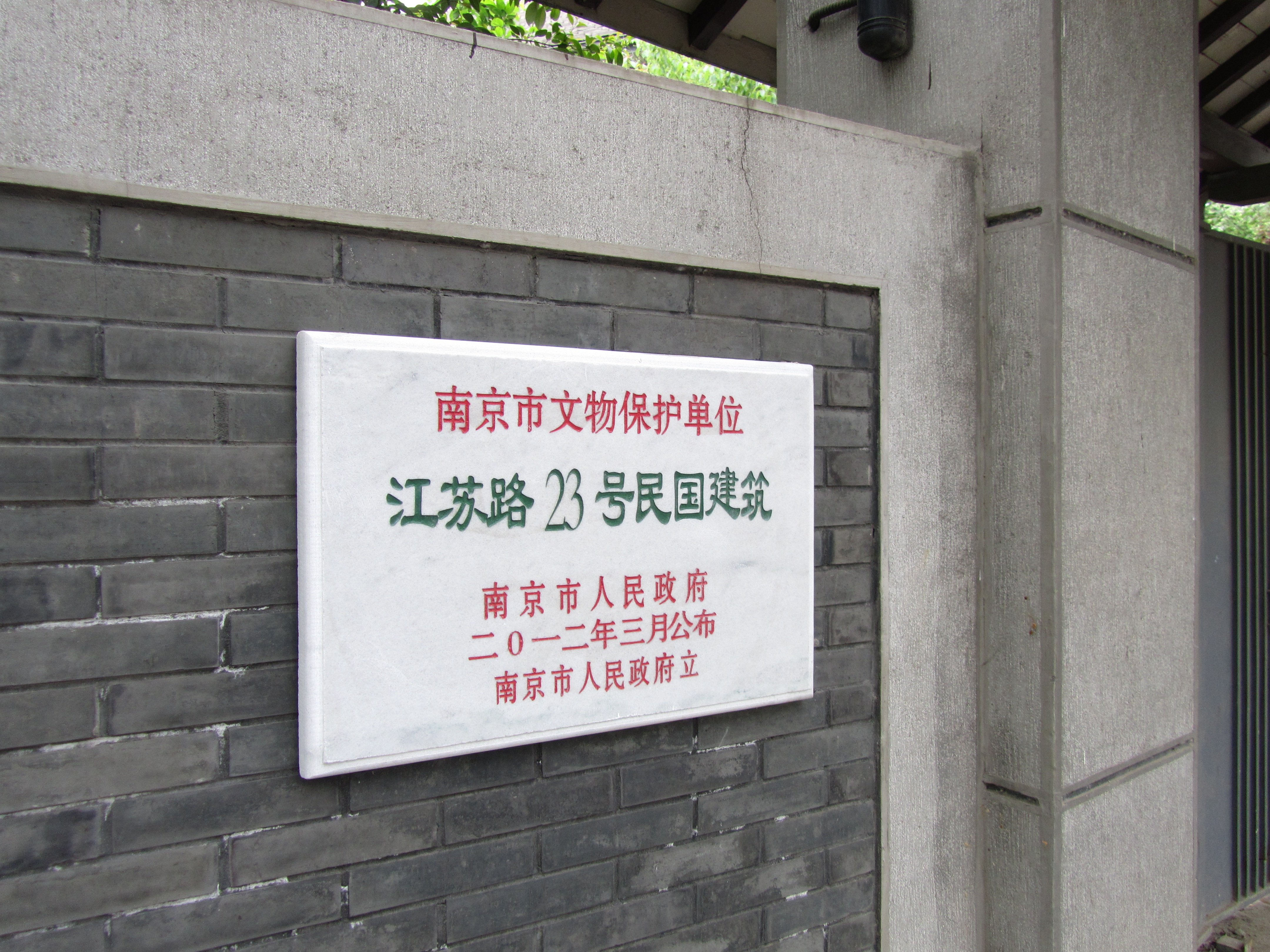 南京江苏路23号薛岳公馆旧址，示文保碑。